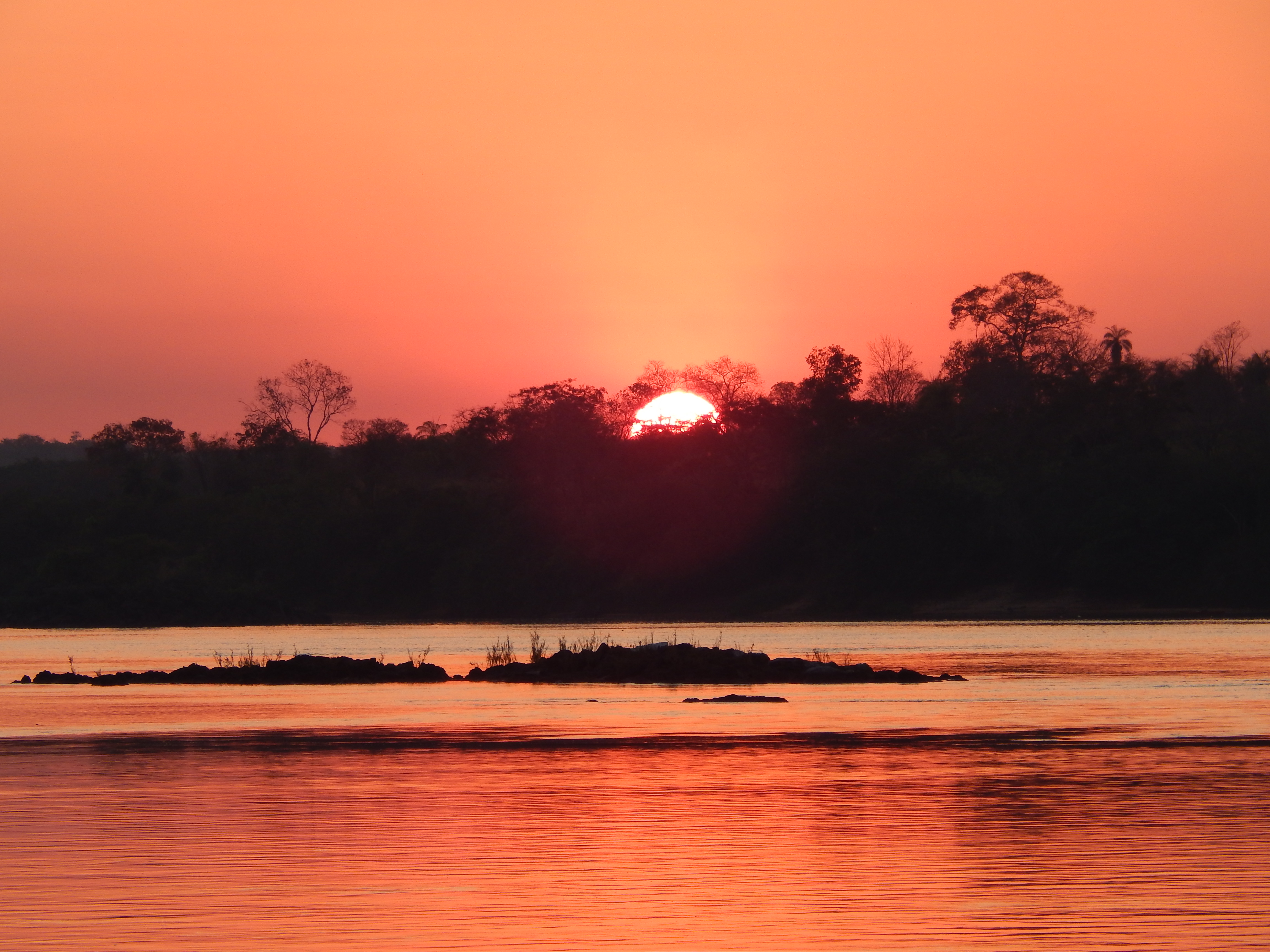 Nascer do sol visto a partir da margem do rio tocantins em Tocantinópolis-TO